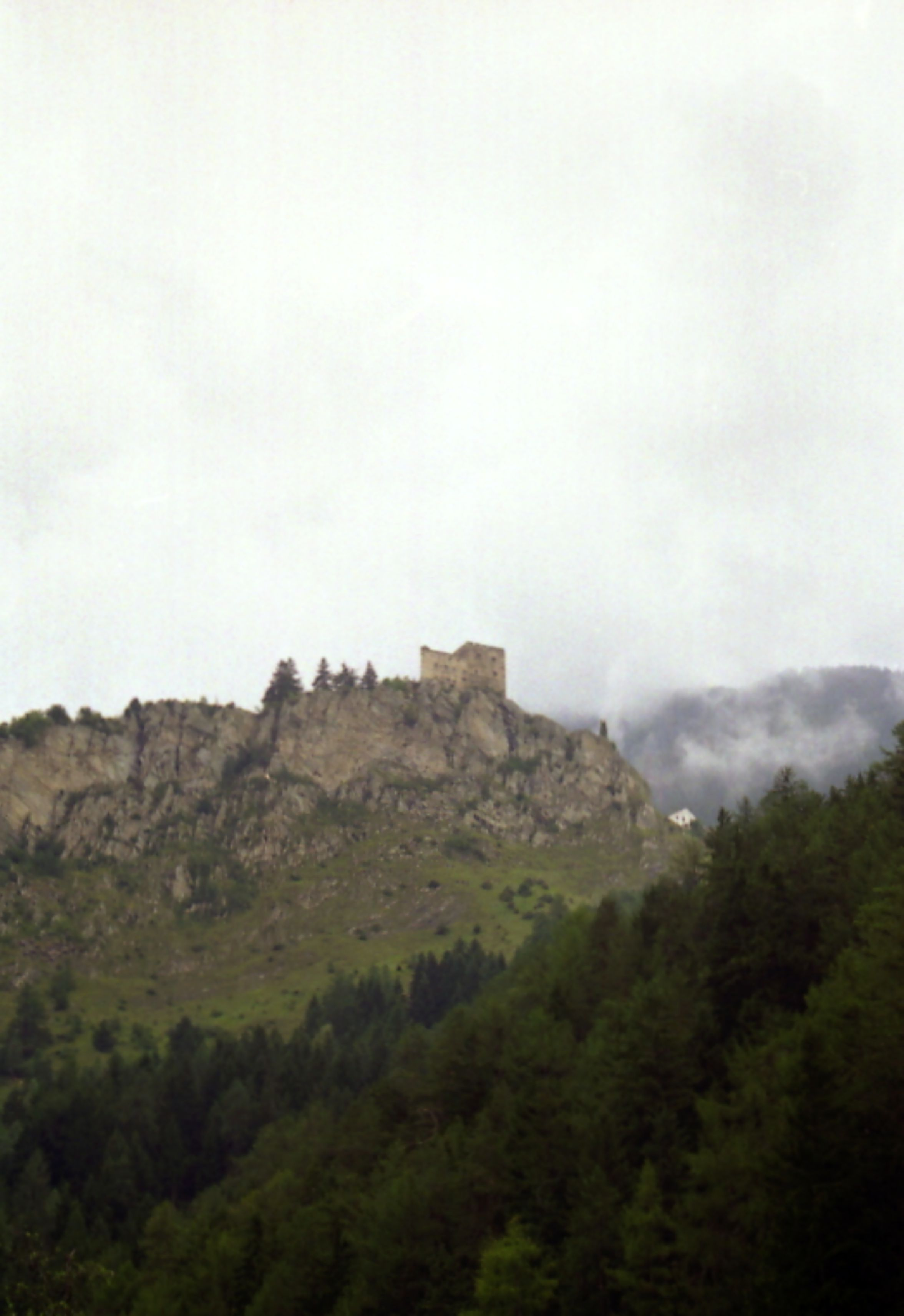 Foto van de ruïne Laudeck in Ladis